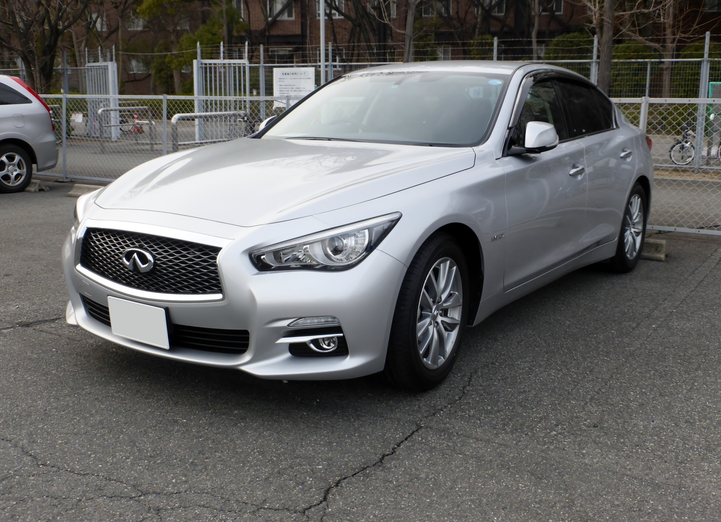 V37型日産・スカイライン350GTハイブリッドをフロントから撮影。